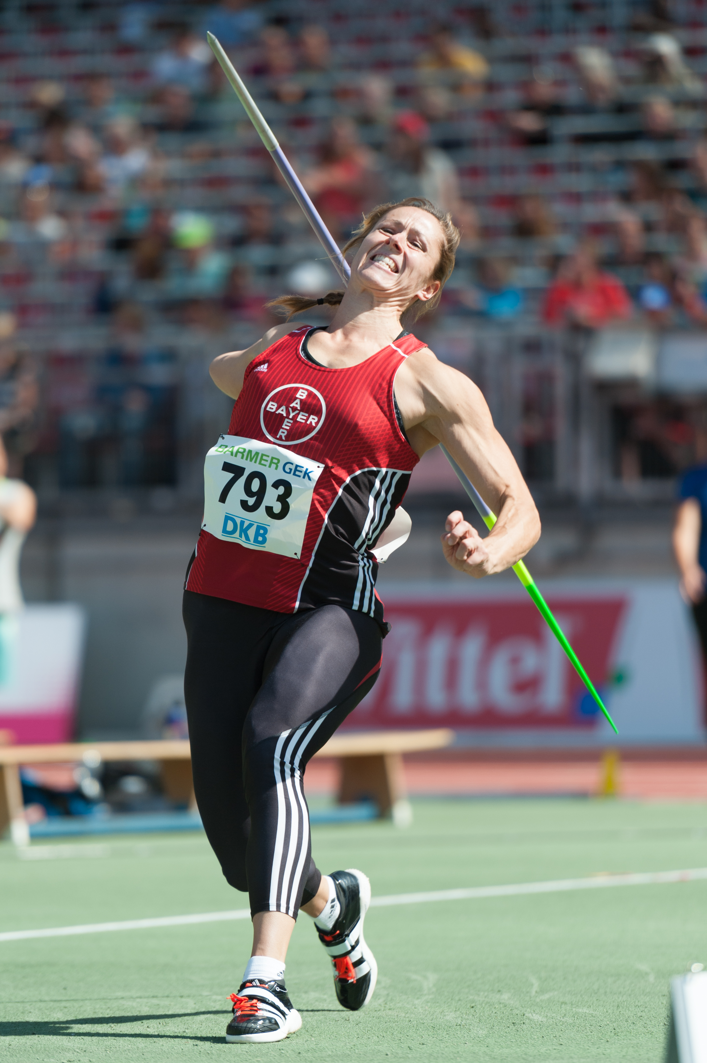 Deutsche Leichtathletik-Meisterschaften 2015: Frauen Speerwurf - Katharina Molitor, TSV Bayer 04 Leverkusen